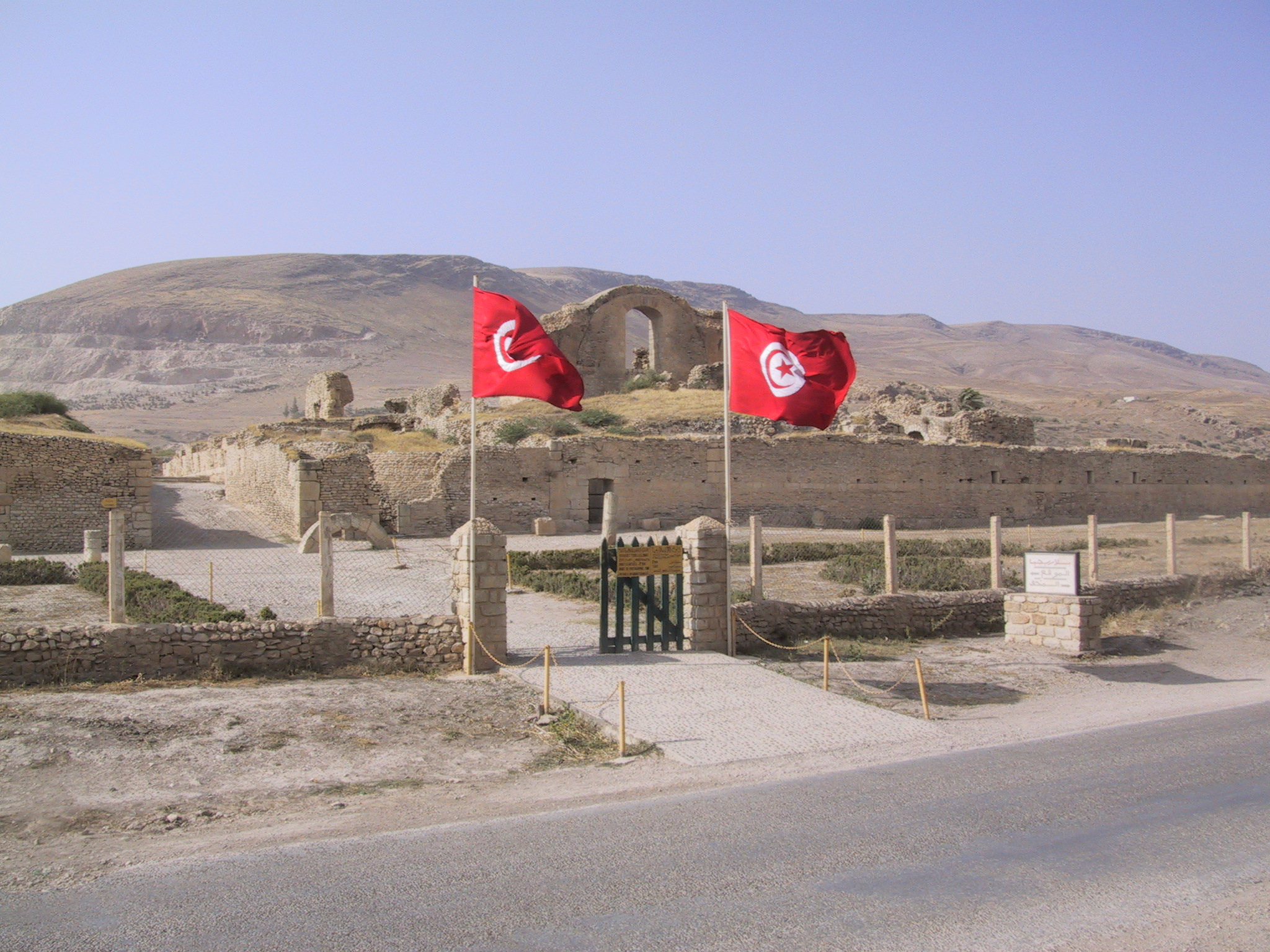 Entrée du site archéologique de Bulla Regia (Tunisie)